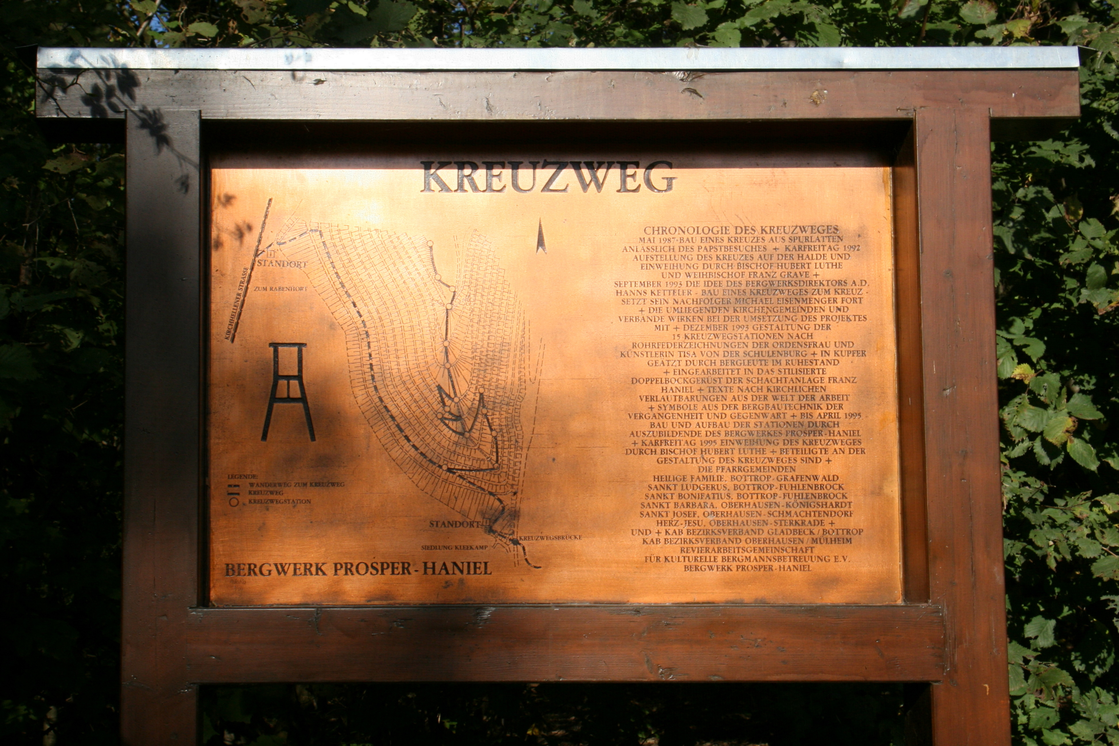 Kreuzweg auf Halde Haniel in Bottrop